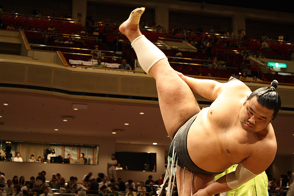 四股で沸く相撲力士。四股が美しい 片山信次